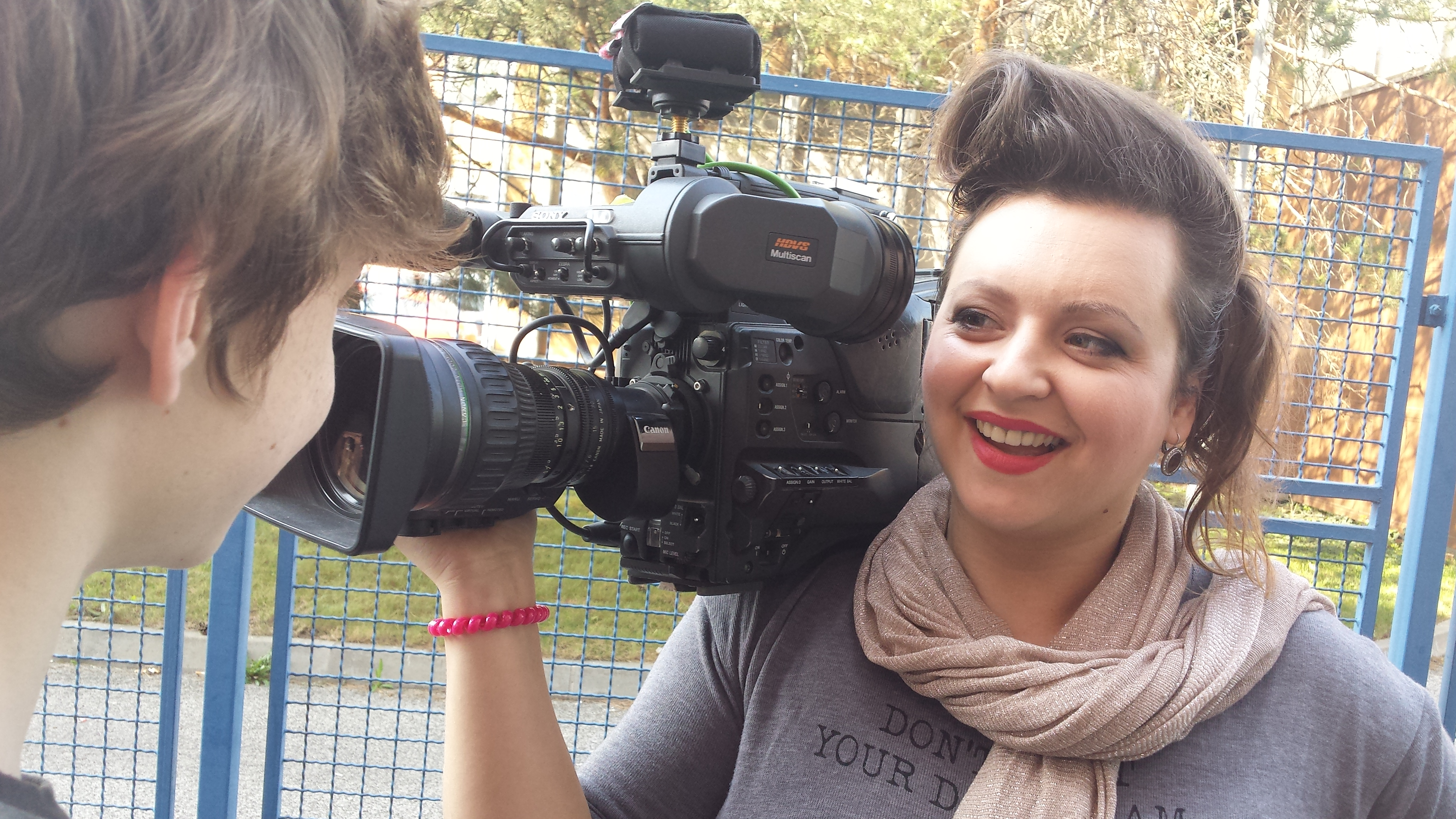 Pri práci na seriáli Rodinné prípady